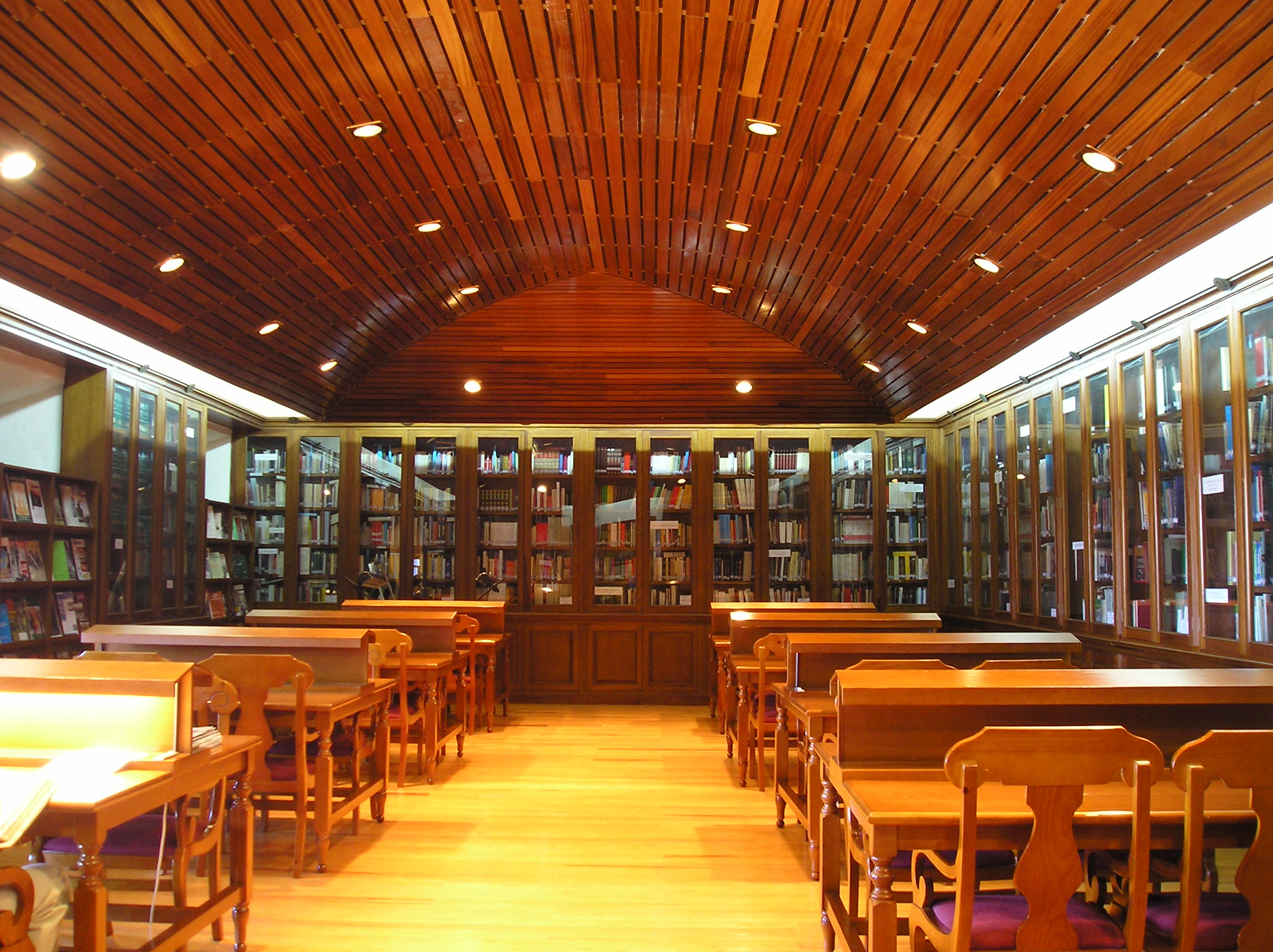 La Biblioteca de la Academia de Artillería está situada en Segovia, España, en el Exconvento de San Francisco. Forma parte de la Academia de Artillería y es la heredera de la ubicada en el Alcázar de Segovia antes de su incendio.1 Tiene un número de volúmenes cercano a los 50000 ejemplares de obras científicas, en particular de matemáticas, geometría, física, astronomía, química, fortificaciones, navegación e historia natural. En ella se encuentra –solo teniendo en cuenta la parte científica y militar- toda la ciencia europea de los S. XVIII y XIX y toda la tratadística artillera y de fortificación de los cinco últimos siglos.